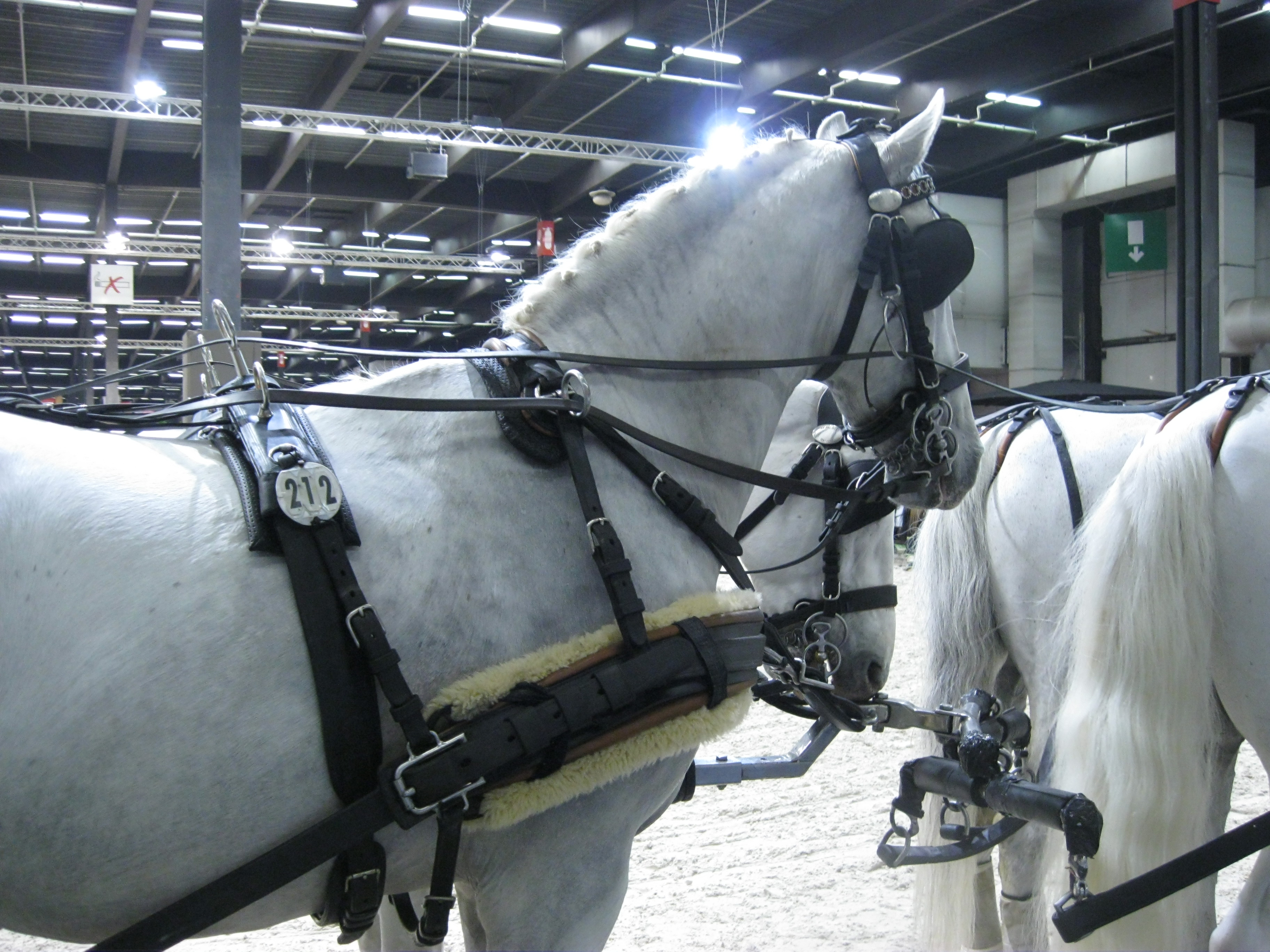 Chevaux du rang arrière de l'attelage du meneur néerlandais Ijsbrand Chardon au jumping international de Bordeaux en 2014.